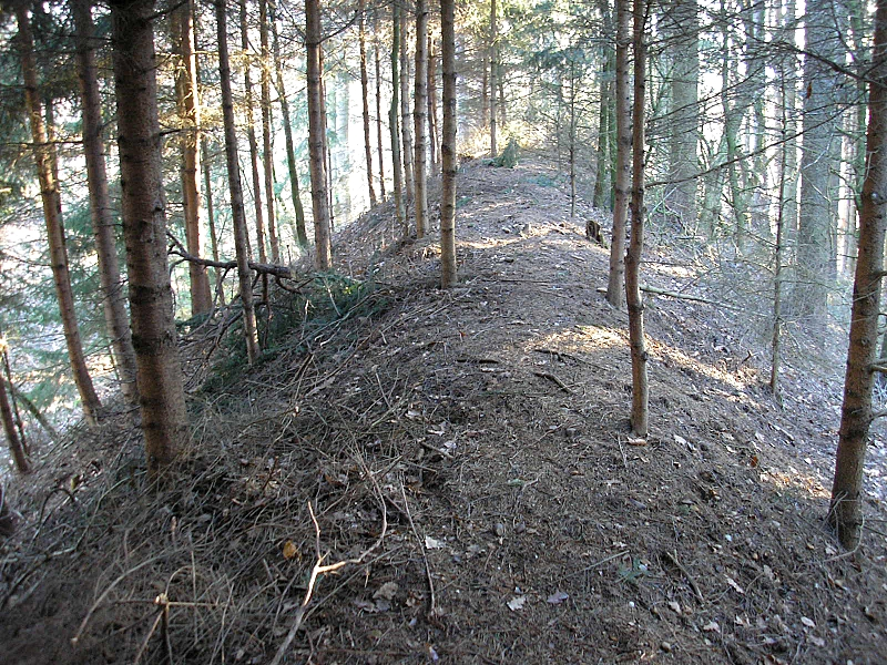 Frühmittelalterliche Abschnittsbefestigung "Pfarrerschanze" bei Todtenweis (Landkreis Aichach-Friedberg, Bayerisch-Schwaben). Die Wallkrone des Hauptwalles nach Süden. Eigene Aufnahme, Feb. 2008 / Early Middle Ages hill fort "Pfarrerschanze" near Todtenweis (Landkreis Aichach-Friedberg, Bavaria, Germany). The central earthworks, looking south. Own photo, Feb. 2008